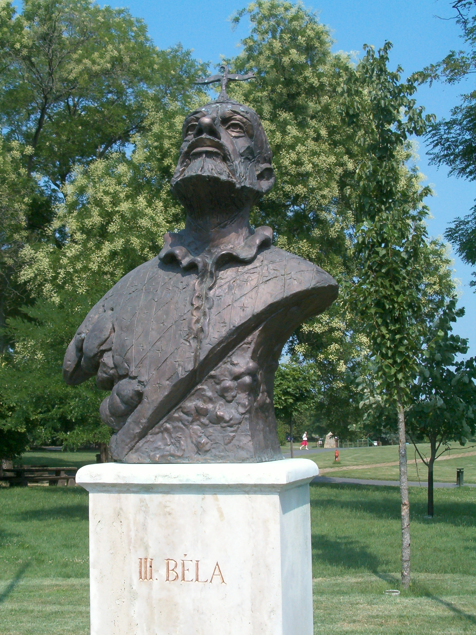 III. Béla király Nemzeti Történeti Emlékpark / National Historical Memorial Park in Ópusztaszer, Hungary (Palotás József alkotása) self shot photo (2005), Váradi Zsolt